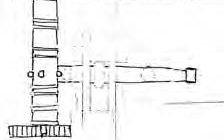 Maglio si San martino parte 1-2